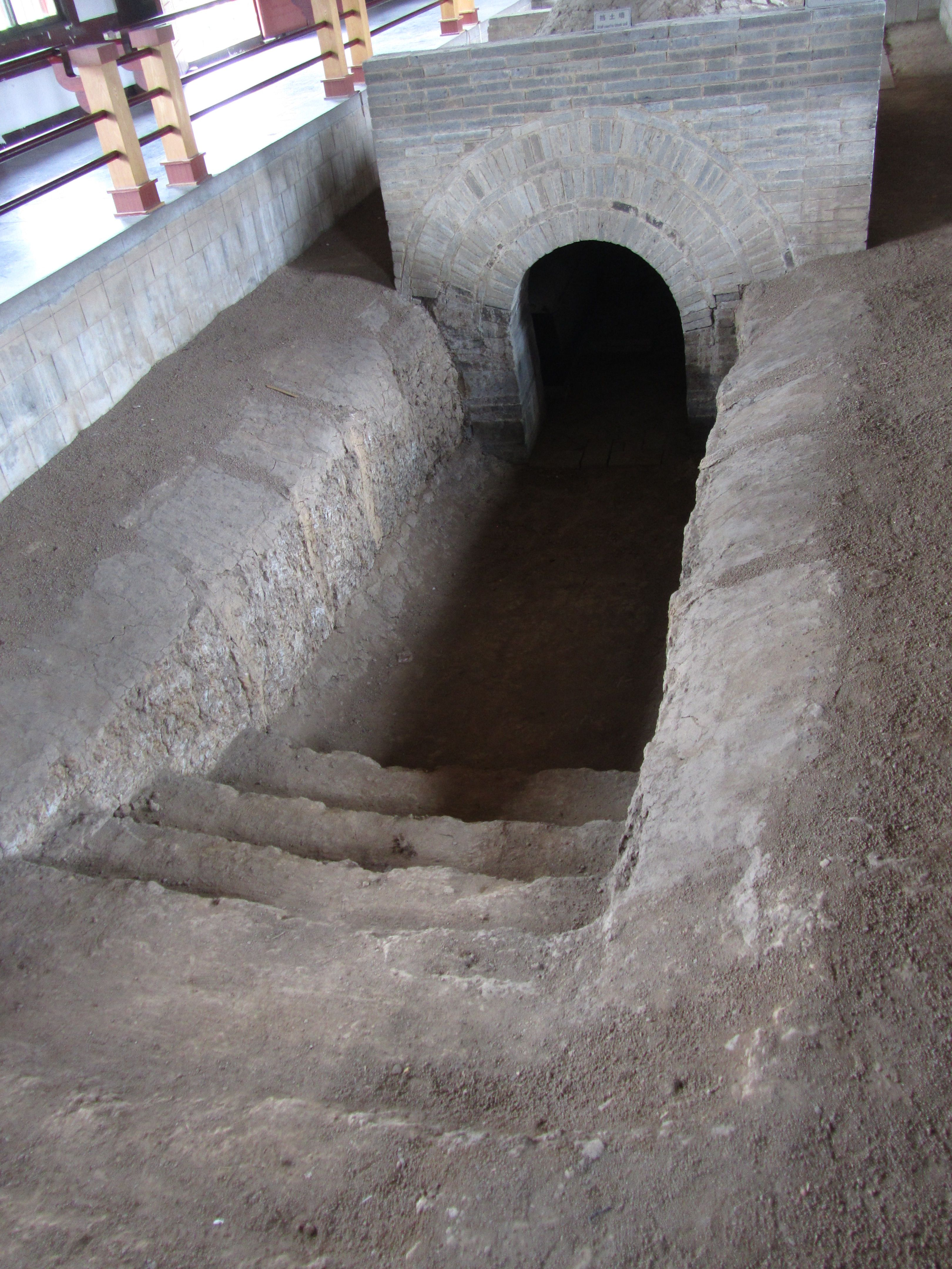 朱然墓，阶梯式墓道。